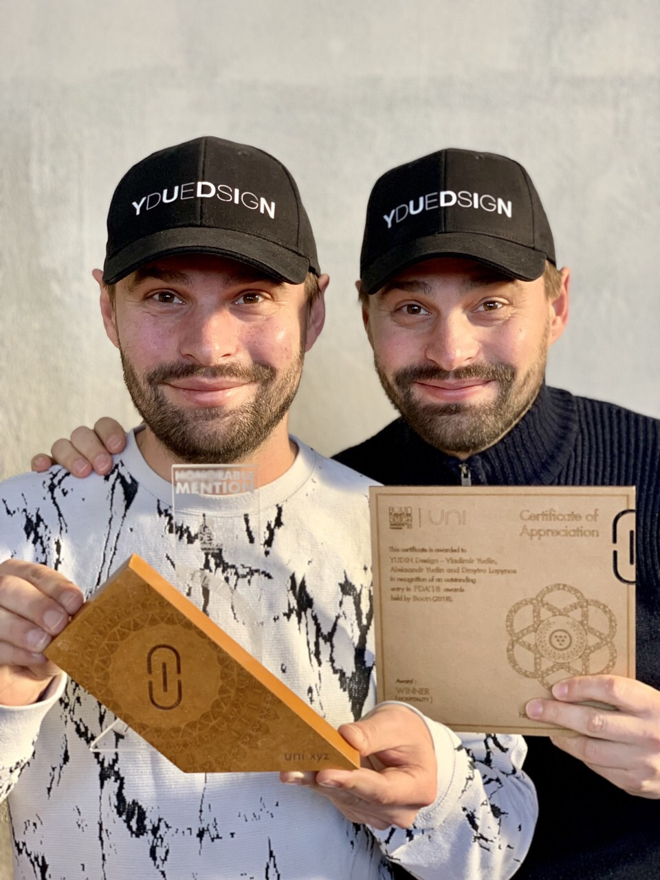 Брати Юдіни отримують нагороду BOUN Awards